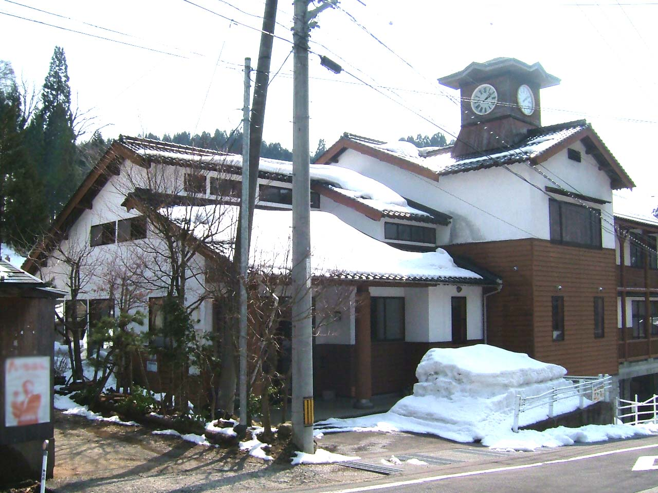 若桜町立若桜小学校舂米分校